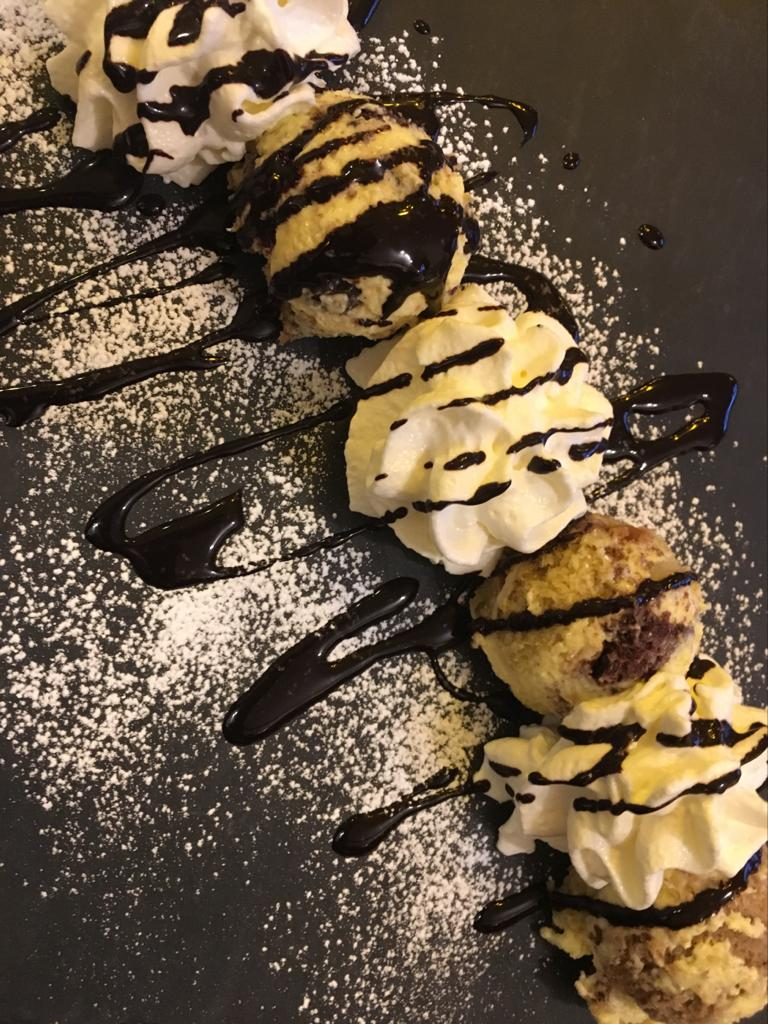 Somlauer Nockerln , Perkowatz-Haz Sopron